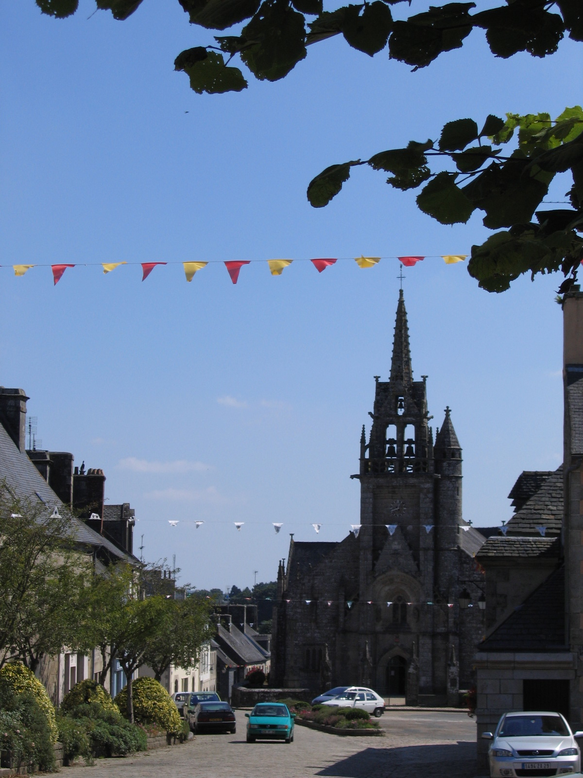 Kirche in Guerlesquin